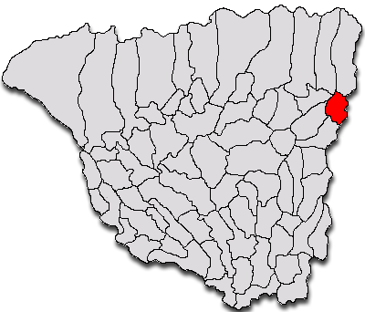 Categorie:Hărţi ale judeţului Gorj